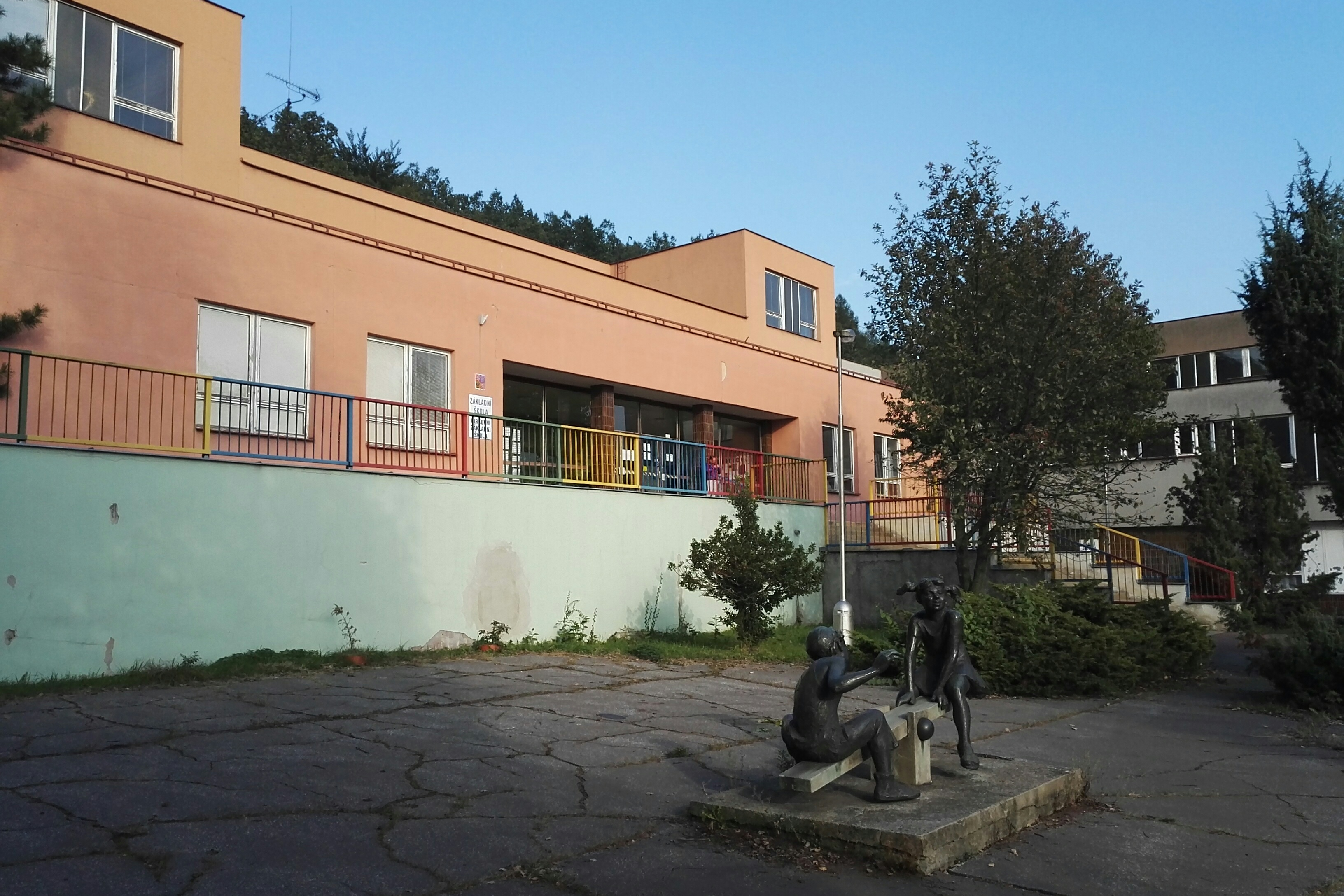 Budova základních škol (veřejné a církevní) na ul. Kaštanové v Třinci - Dolní Lištné